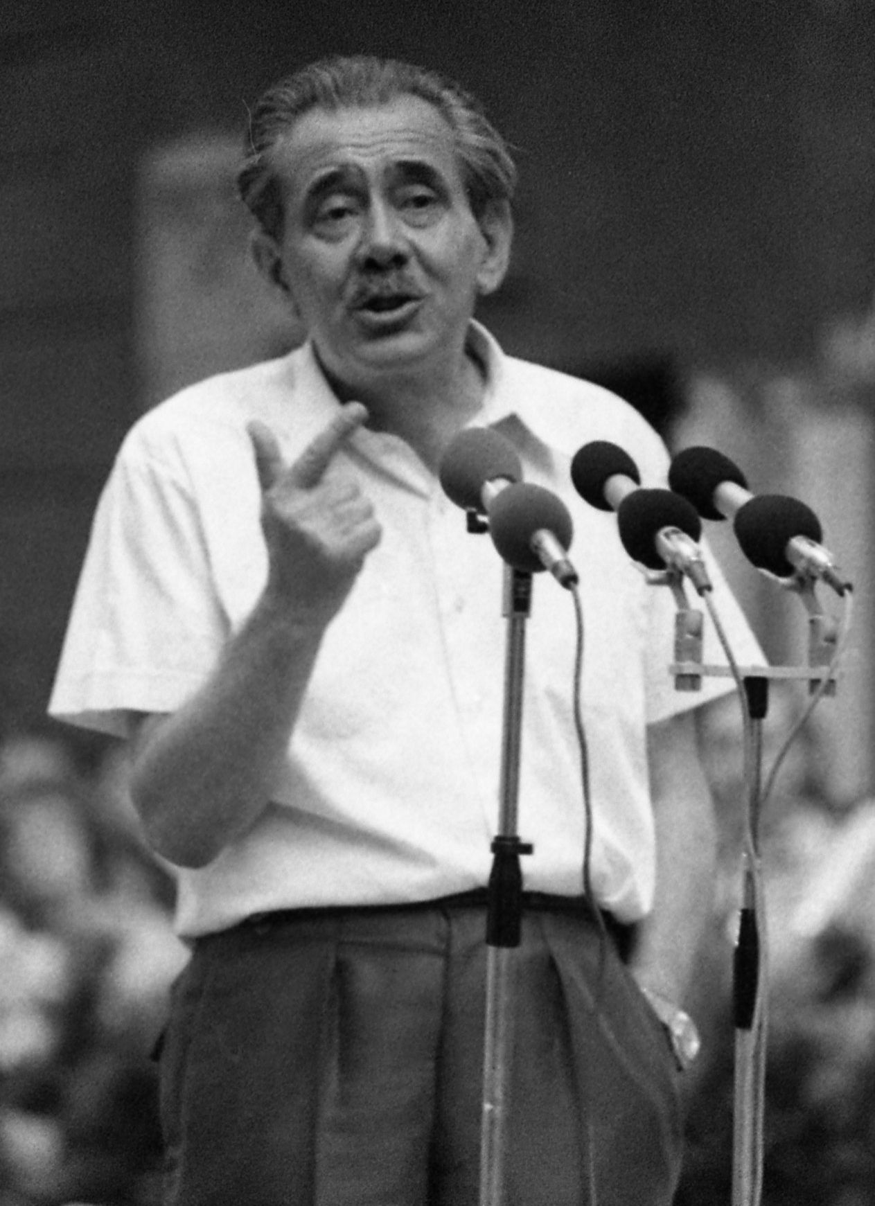 Aczél György kultúrpolitikus